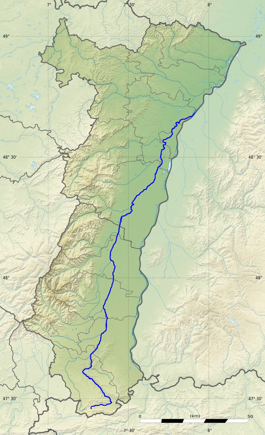 תוואי נהר איל . מקור: File:Alsace region relief location map.jpg